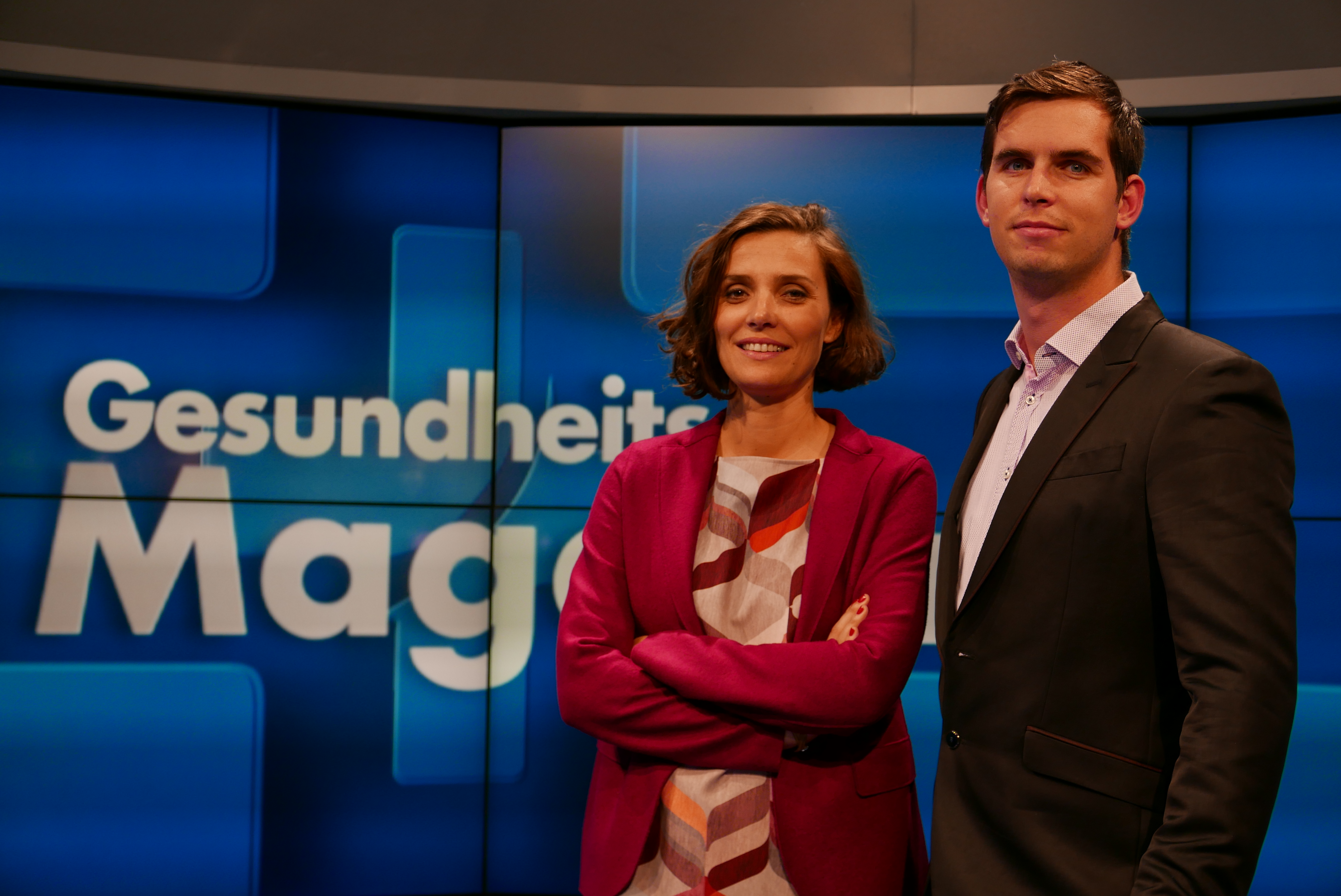 Moderatoren Gertrud Prenn und Florian Mahlknecht